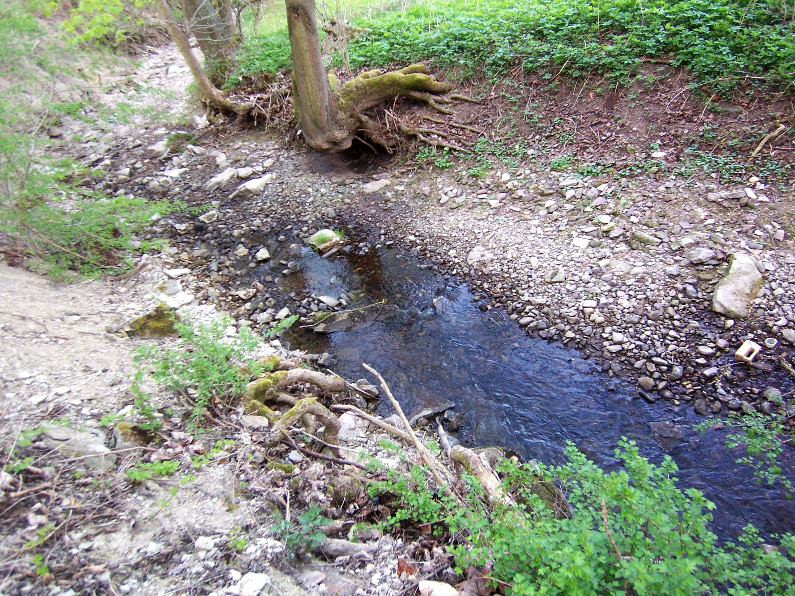 Zahme Gera Versickerung östlich Rippersroda 23.04.2014. Die Zahme Gera versickert strömend im Untergrund und tritt am Spring von Plaue mit hohem zeitlichen Versatz wieder zu Tage.